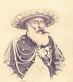 Photo du colonel Dupin